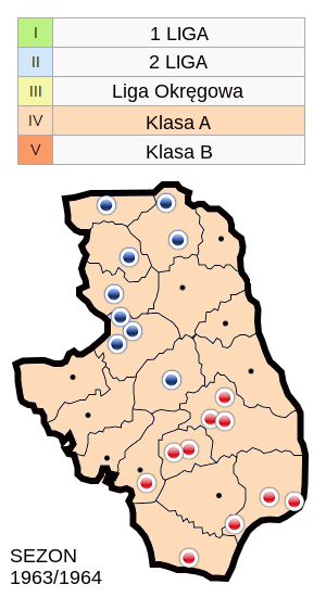 Jagiellonia w sezonie 1963/64- mapa klubów